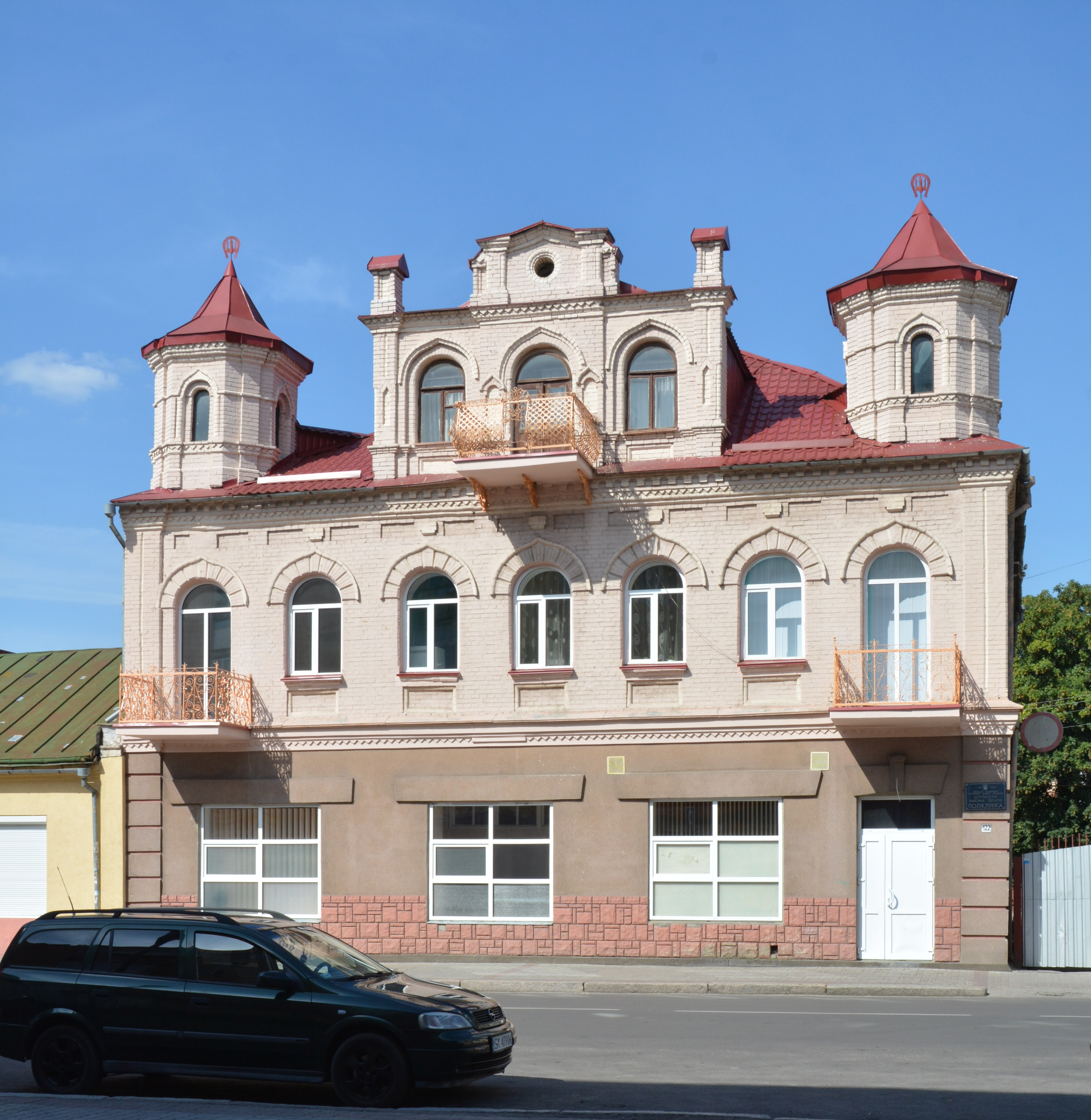 Дворовий корпус (мур.), Ковель, вул. Незалежності, 122